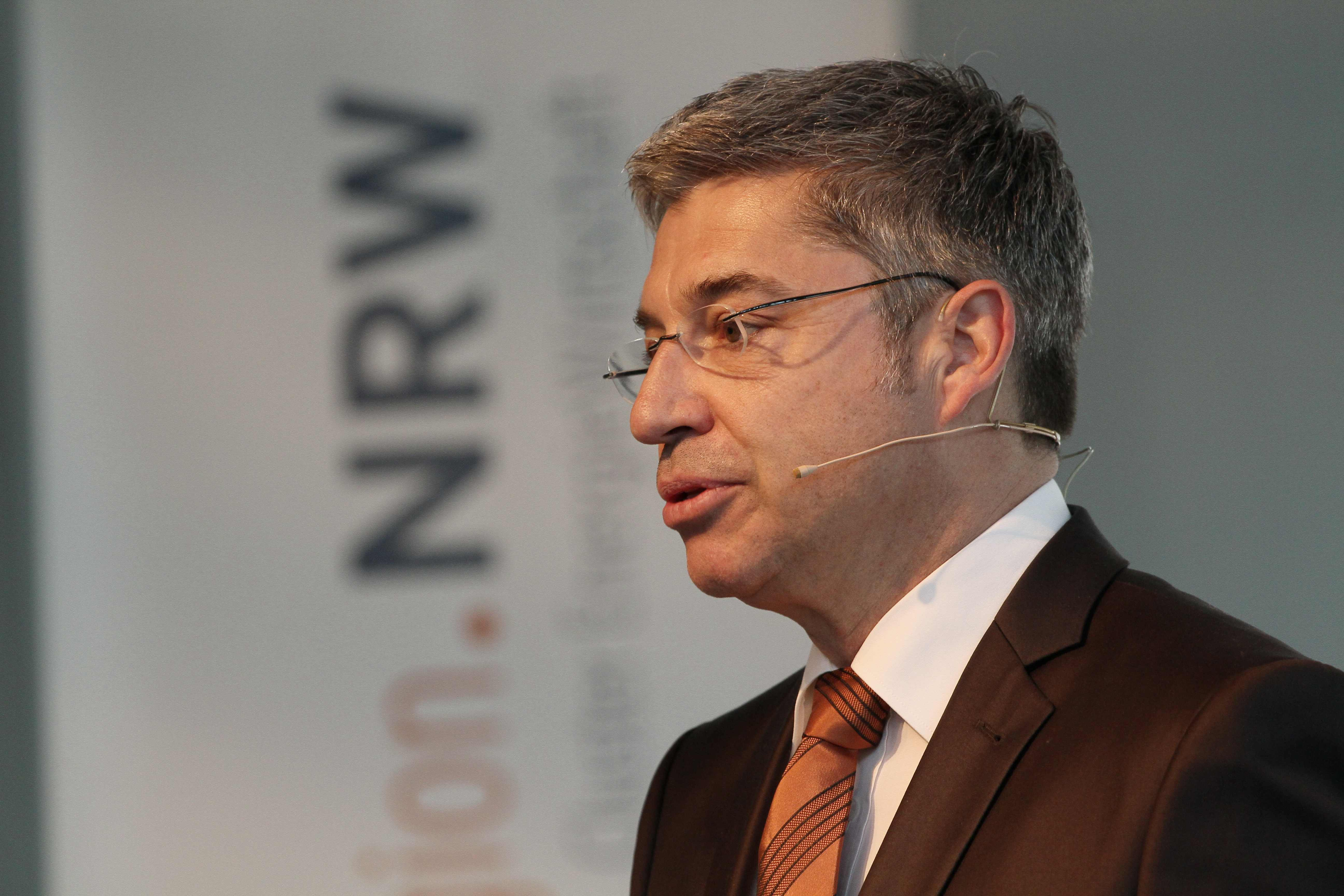 Jahrestagung des Netzwerks Kraftwerkstechnik, Thomas Heyer Veranstaltung der EnergieAgentur:NRW in der Landesvertretung NRW zum Thema "Netzwerk Kraftwerkstechnik - Mit Innovationen Zukunft sichern" am 16.04.2013, Copyright Peter-Paul Weiler, berlin-event-foto.de, Tel. 01577 4720112 / Veröffentlichung und Verwendung nur mit Autorenangabe Flickr tags: EnergieAgentur.NRW; Netzwerk; Kraftwerkstechnik; Jahrestagung; Berlin